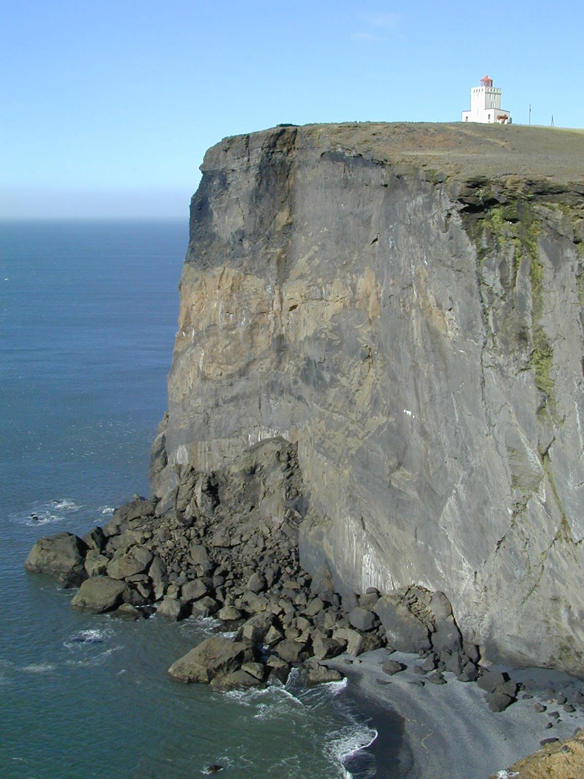 Der Leuchtturm von Dyrhólaey